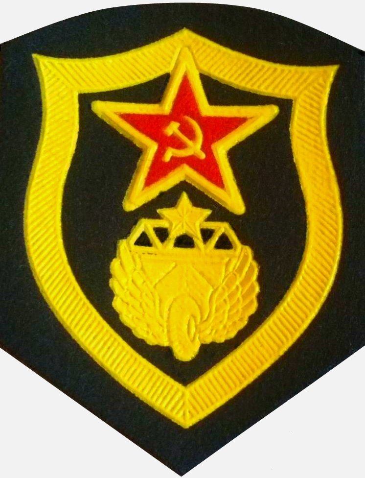 Шеврон Дорожных войск СССР с 1988 года